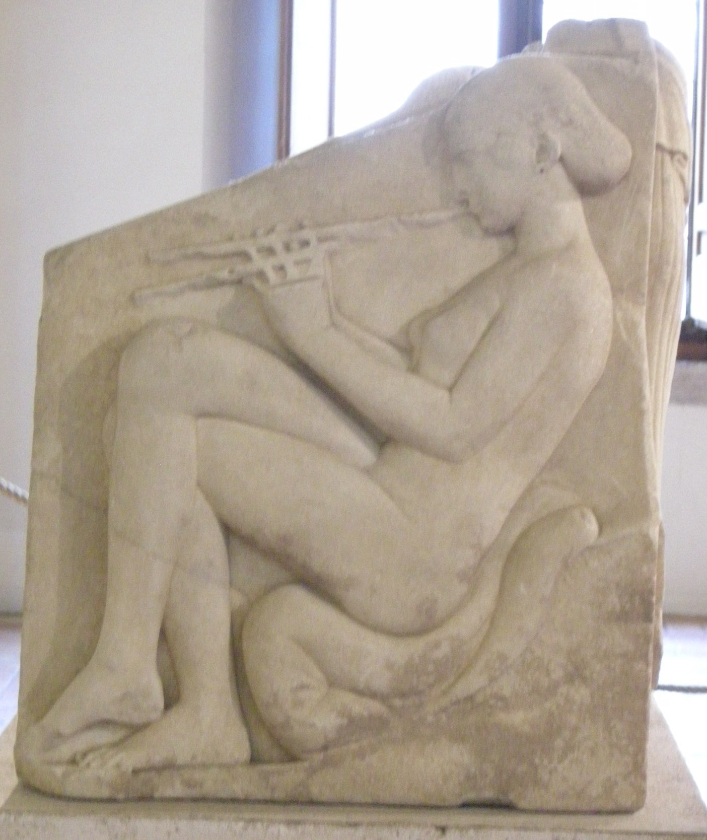 Ludovisi Throne